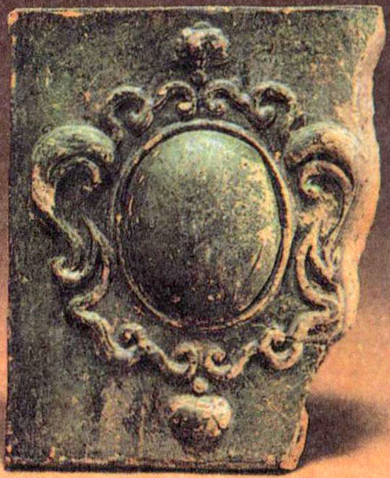 Магілёўская кафля. Паліваная кафля з выявай картуша. 18 ст.